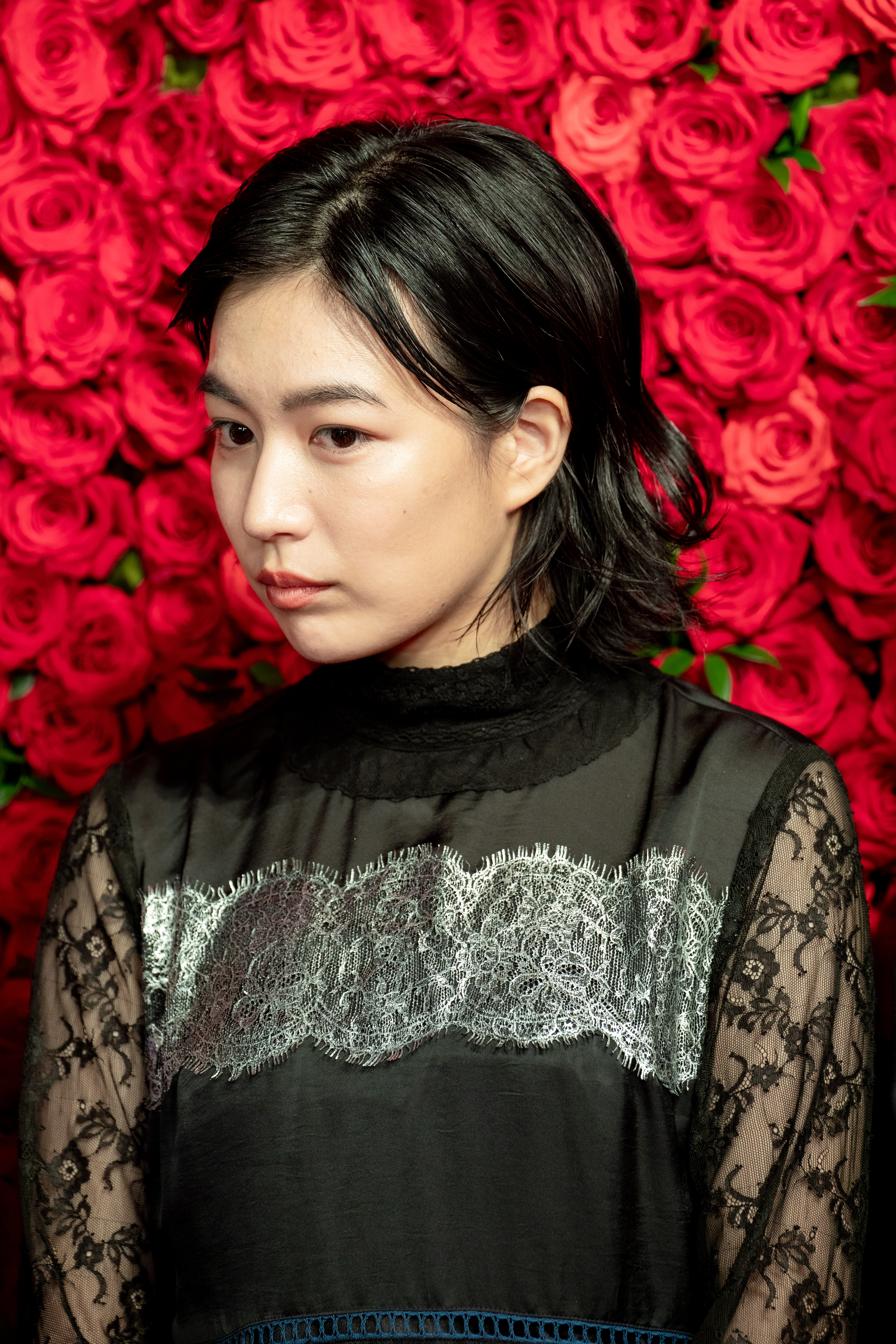 第30回 東京国際映画祭 オープニングセレモニー 木竜麻生 (鈴木家の嘘)